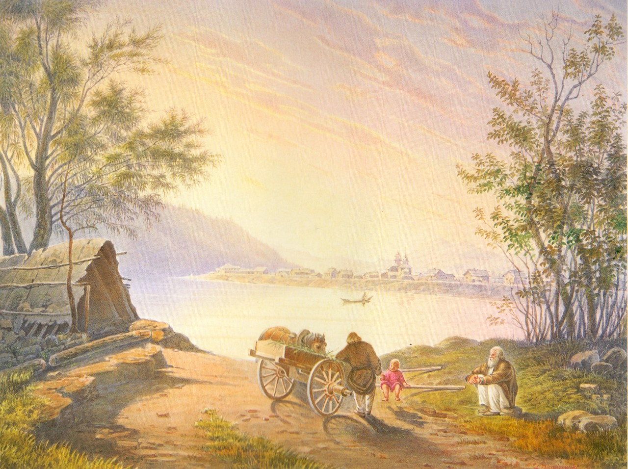 Деревня Жиндо на реке Чикой у китайской границы, 1840-50-е.